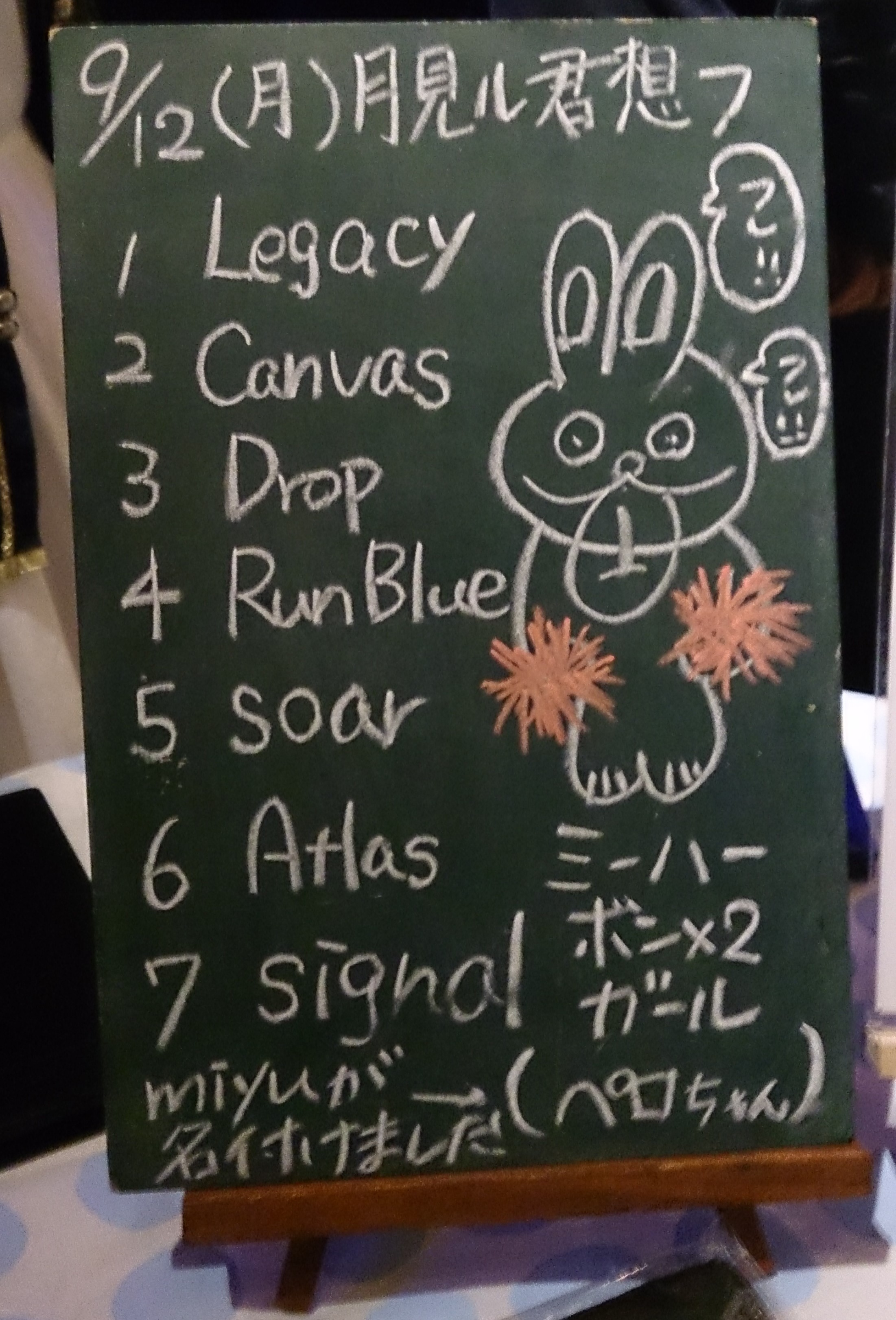 amiinAセトリボード(20160912(1))